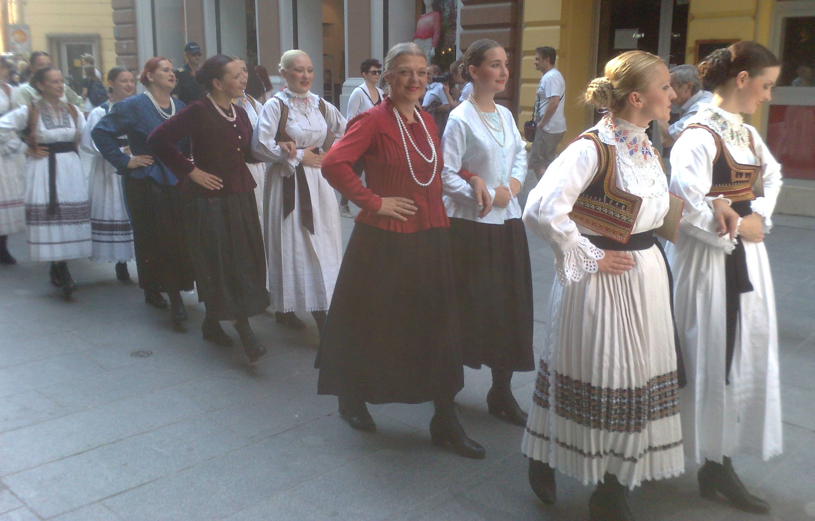 Članice folklornog društva u iz Hrvatske u svojoj narodnoj nošnji